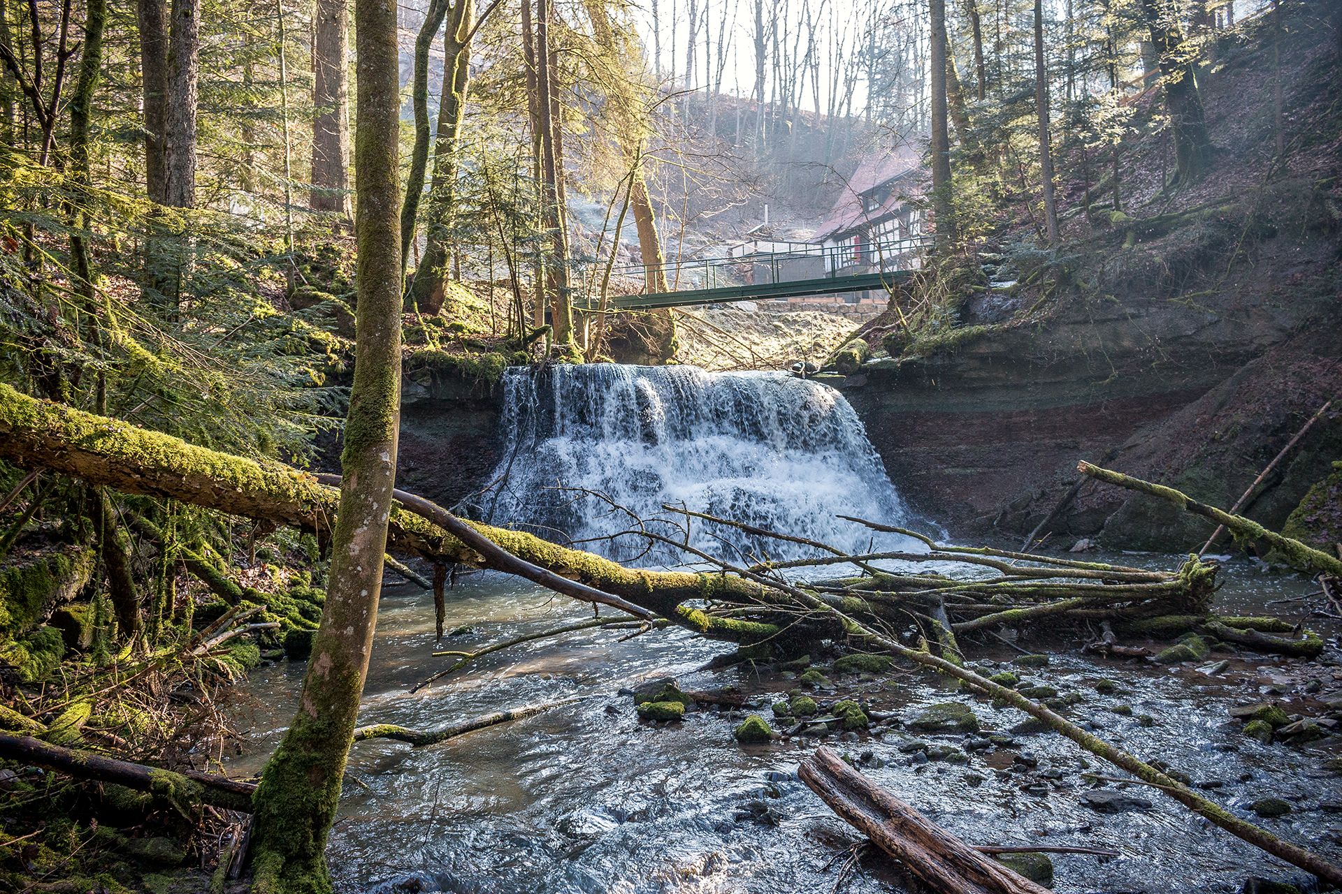 (NSG:BW-1.084)_Wieslaufschlucht und Edenbachschlucht